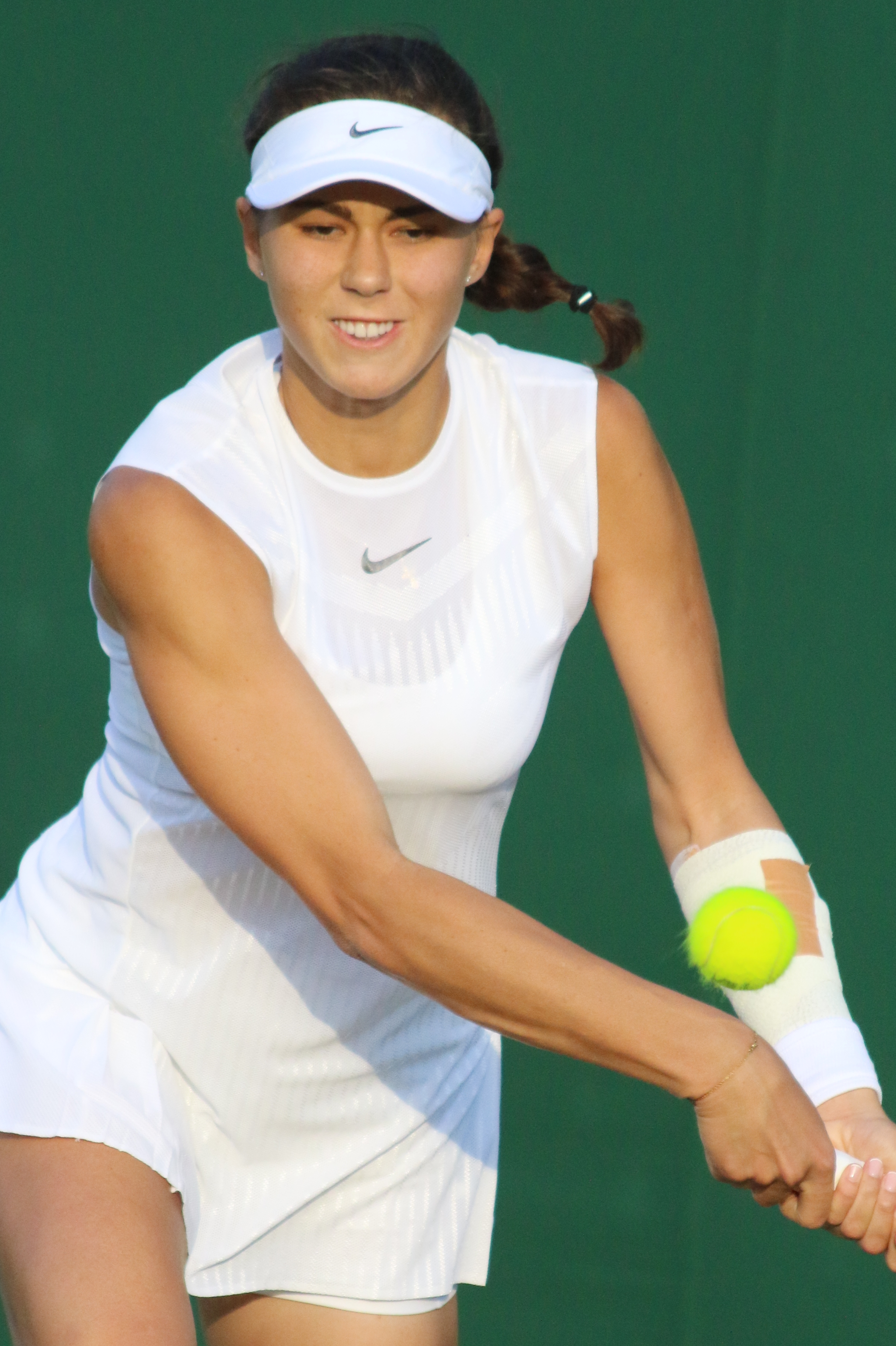 Vikhlyantseva WM17 (22)